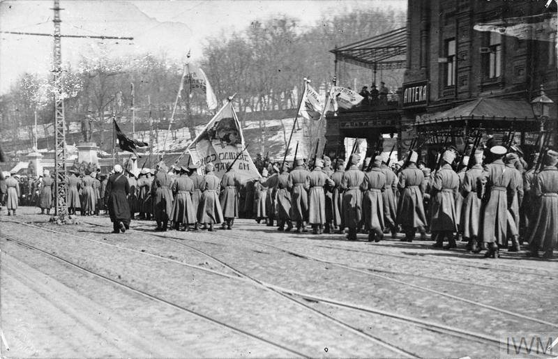 Ukrainian soldiers in Kyiv in 1917